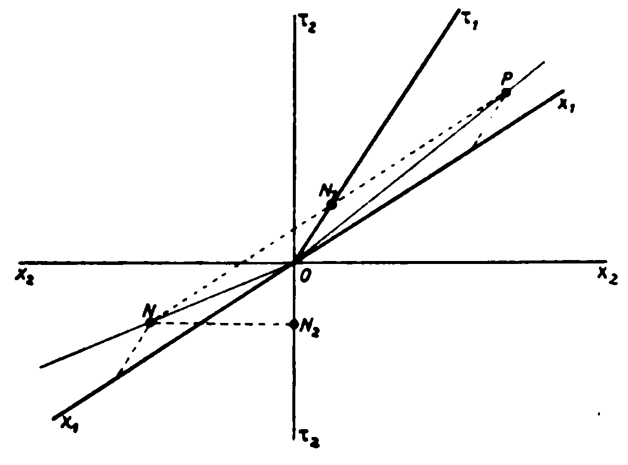 Überlichtgeschwindigkeit, Diagramm